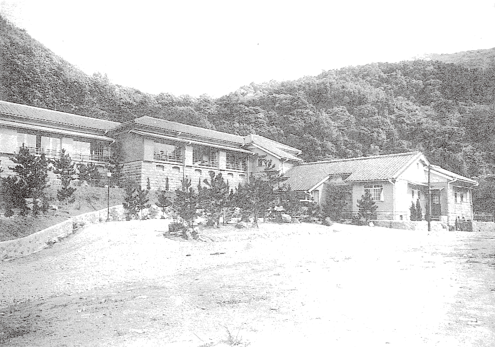 中文（台灣）: 1933興建之草山林間學校 ，原址現位於青邨介壽堂西側。